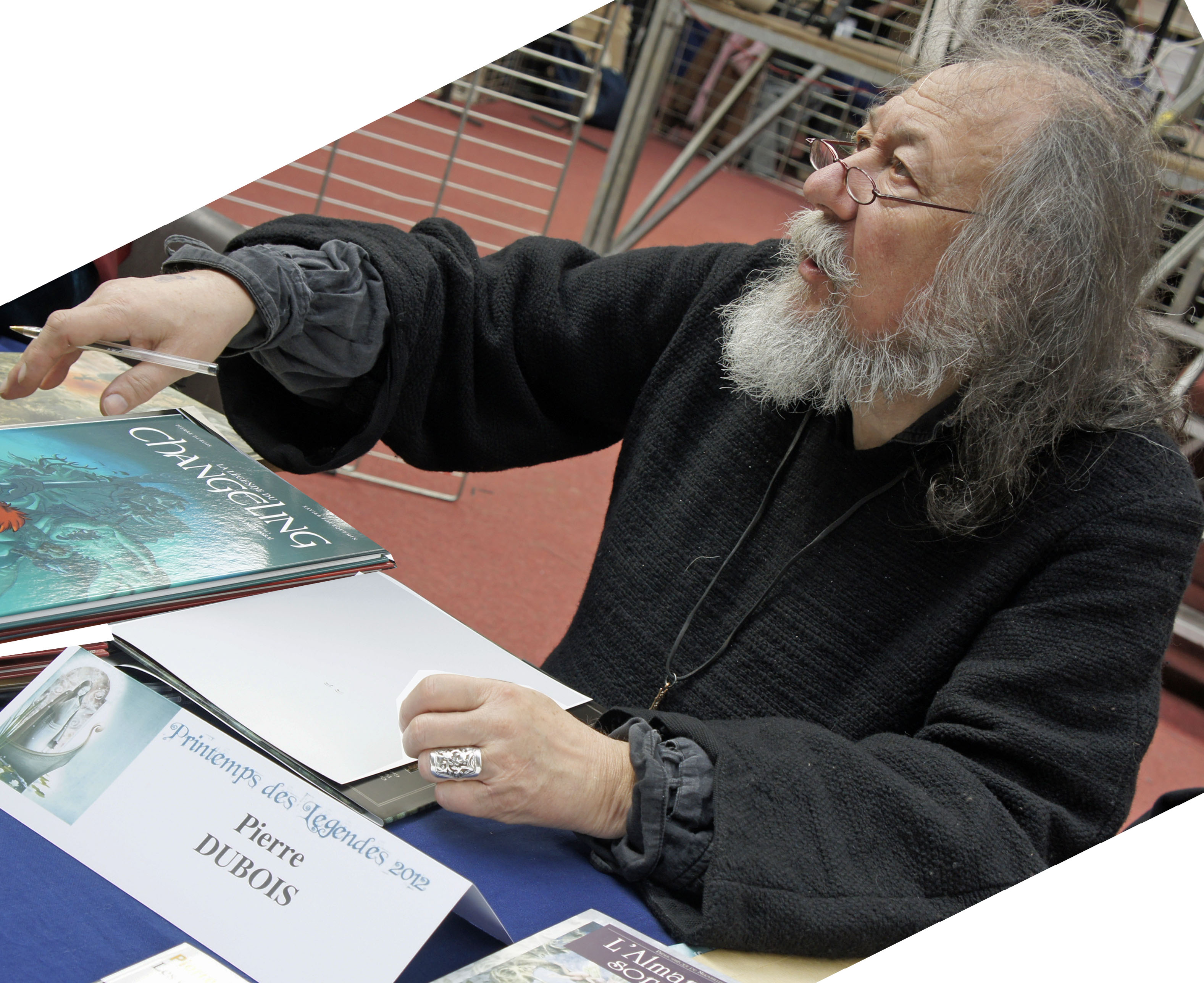 Pierre Dubois lors du Printemps des Légendes 2012.